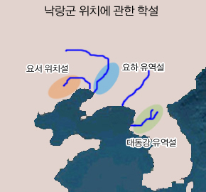 낙랑군 위치에 관한 여러 이견을 종합, 대표적인 학설을 지도상에 표시